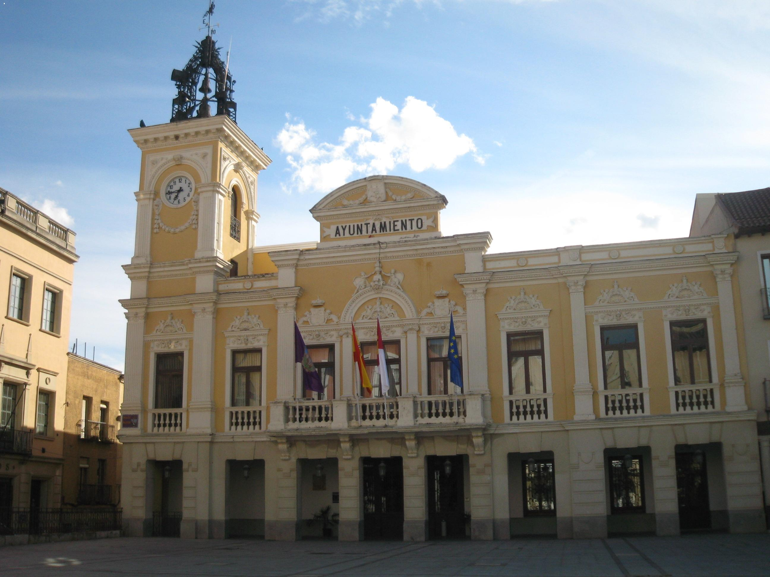 Hall of Guadalajara, Spain